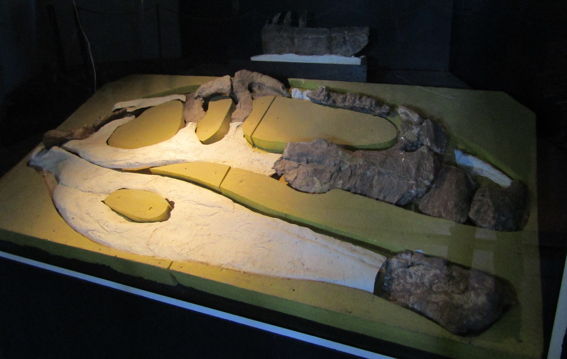 Restos originales del lado derecho del cráneo de Giganotosaurus carolinii en el museo Paleontólogico Ernesto Bachmann